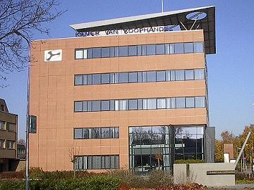 KvK te Zwolle